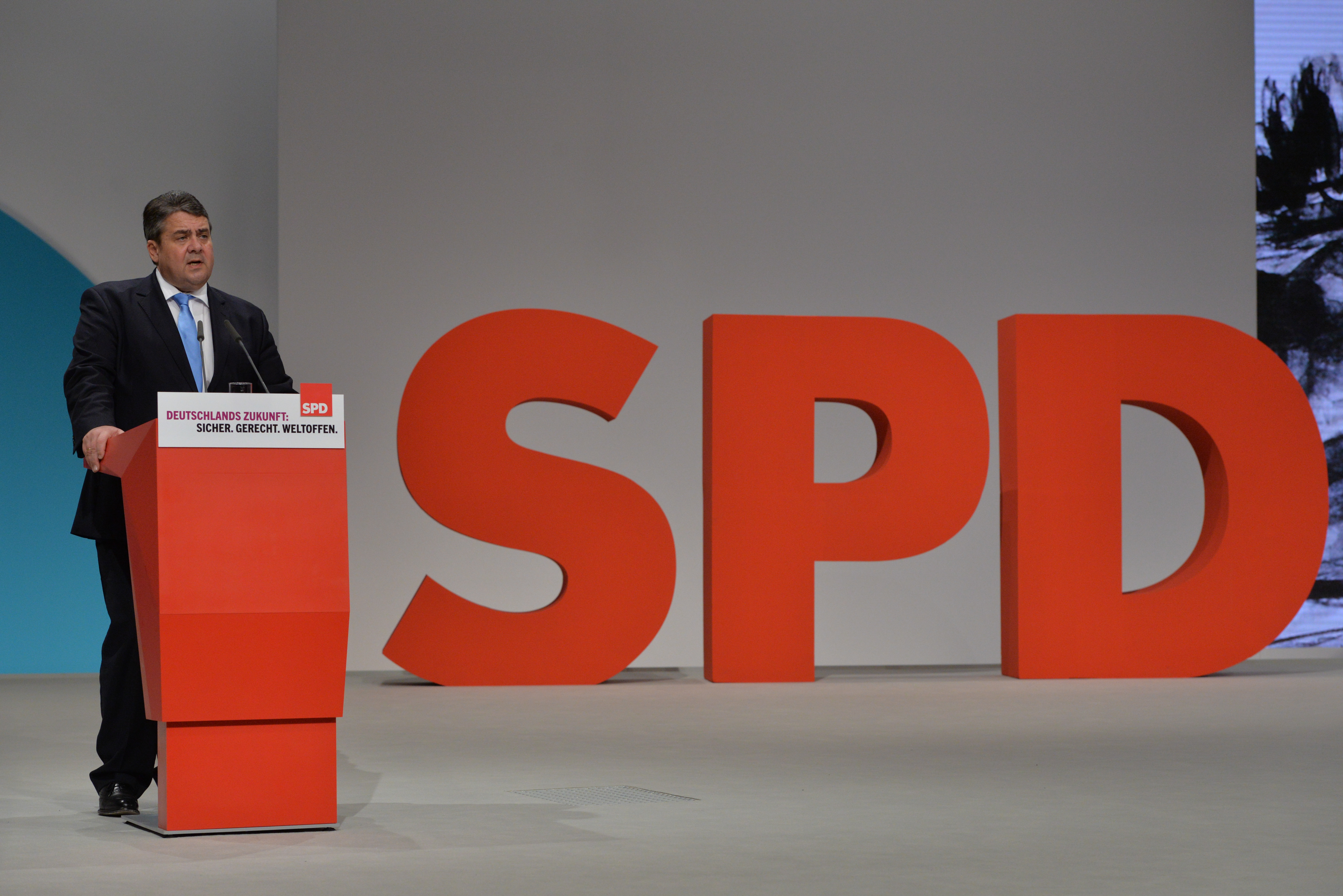 Olaf Scholz auf dem SPD Bundesparteitag Berlin, 10.-12. Dezember 2015, CityCube, Messe Berlin